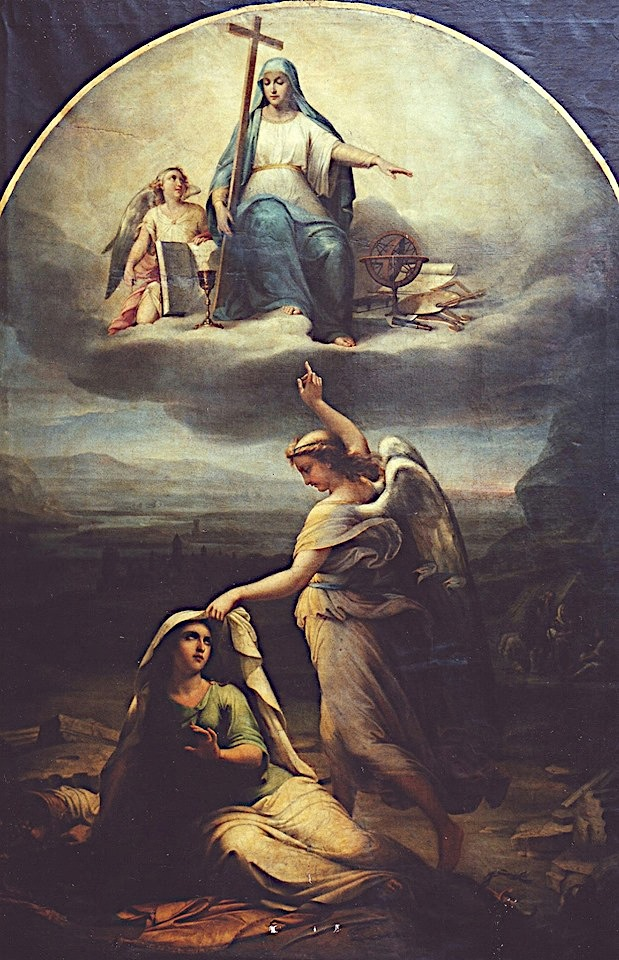 Gheorghe Tattarescu - Renaşterea României - Alegorie concepută la Roma, semnificând renaşterea ţării prin ştiinţă, artă şi credinţă, Muzeul Municipiului Bucureşti, 229x154 cm. Alegorie concepută la Roma, semnificând renaşterea ţării prin ştiinţă, artă şi credinţă. Compoziţia este construită pe două planuri: jos, o femeie trezindu-se din somn, simbolizând România ce-şi rupe lanţurile sclaviei (stânga jos, steagul românesc e desfăşurat parţial). Un înger îi ridică vălul obscurantismului, arătând spre planul superiorsimbolurile personificate ale ştiinţei, artei şi credinţei. În stânga jos este figurat cornul abundenţei iar în dreapta, prin contrast, o familie de ţărani săraci în faţa unei colibe schiţate. Trăsăturile fizionomice sunt bine conturate iar vestimentaţia drapată. În fundal sunt figurate Dunărea, Carpaţii şi ruinele fostei capitale Târgovişte. Compoziţia păstrează caracterele stilistice ale picturii alegorice. Cromatica: bogată gamă de griuri fin nuanţate, ocruuri, brunuri, diverse nuanţe de albastru şi verde.